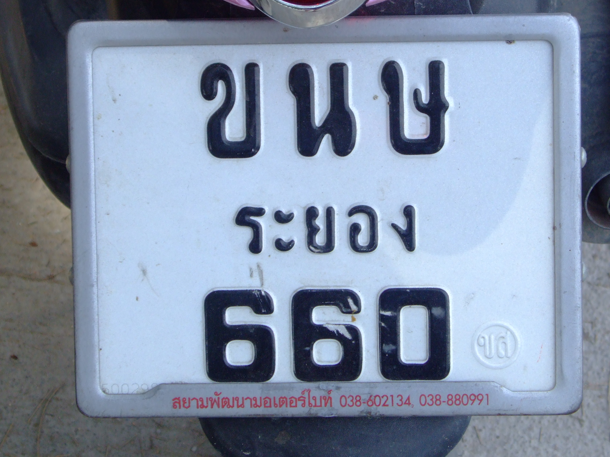 Foto propria Novembre 2009